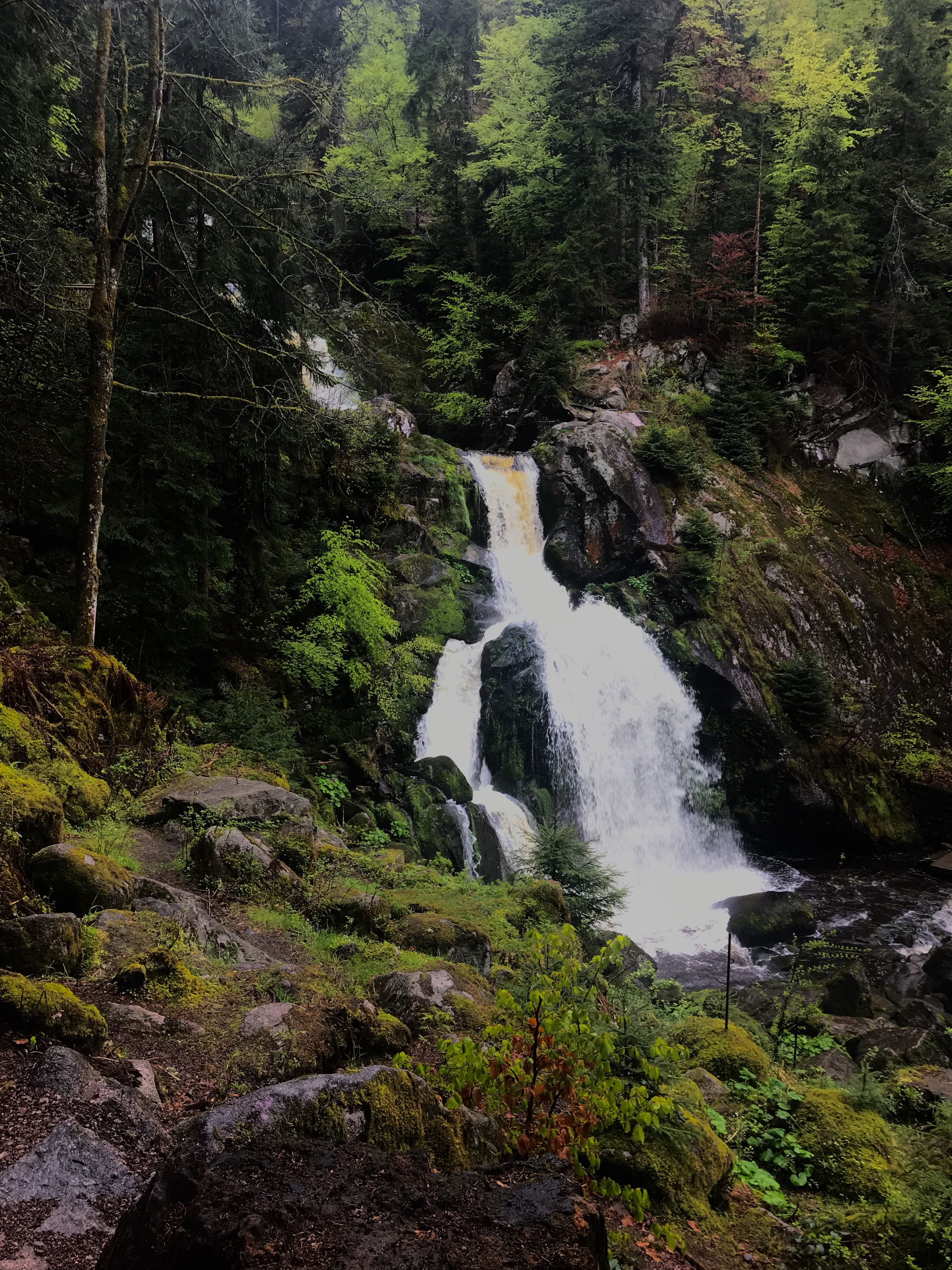 Водопад Триберг, средний каскад, Германия